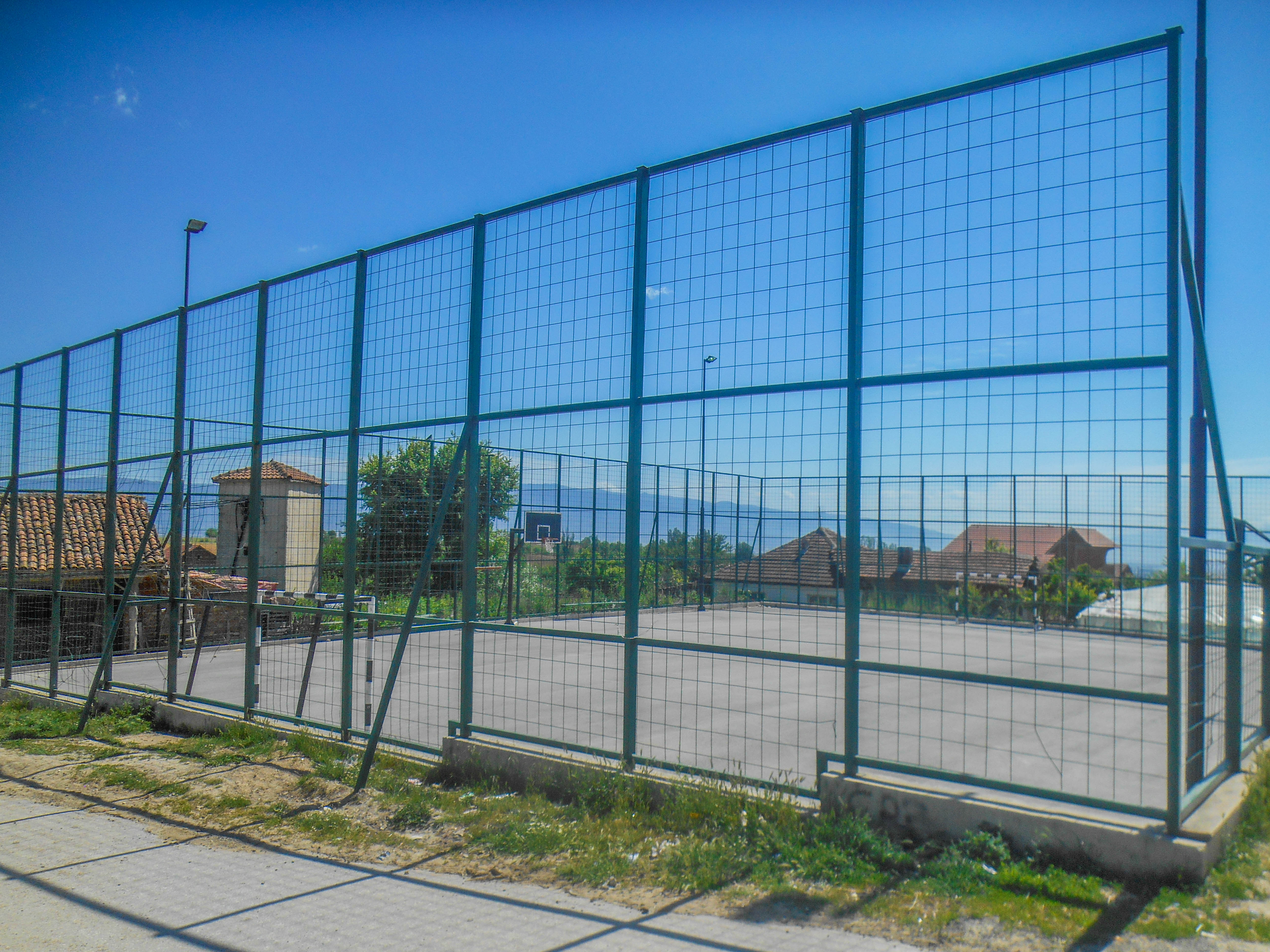 Спортско игралиште - Седларци